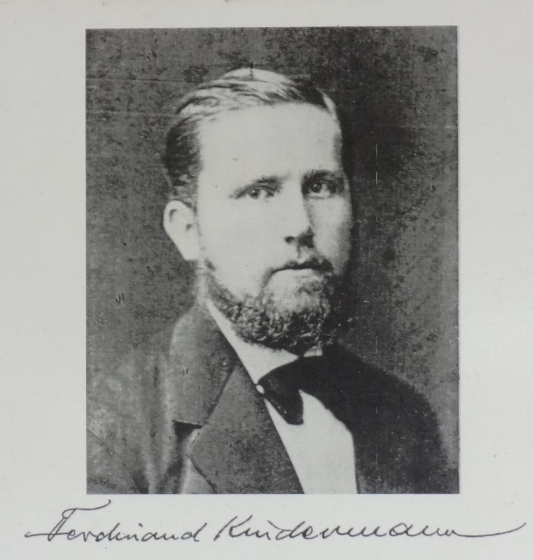 Ferdinand Kindermann, Abbildung auf einer frei zugänglichen Informationstafel neben dem Findling in Waldsieversdorf